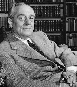 Bertil Malmberg.